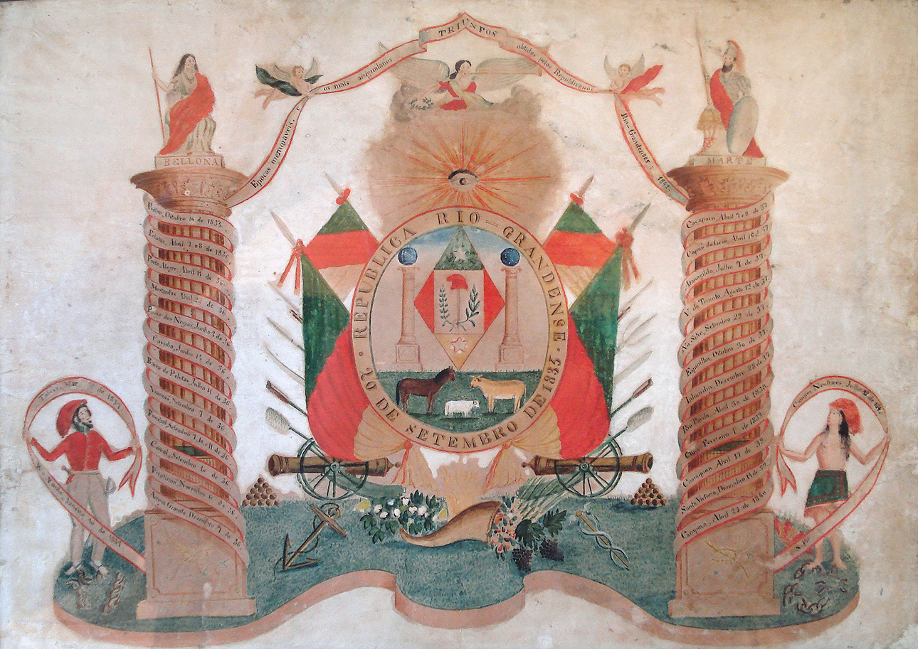 PEDROSO, Padre Hildebrando de Freitas: Alegoria Farroupilha, aquarela sobre papel, colado em papelão. Acervo do Museu Júlio de Castilhos, Porto Alegre, Brasil. Segundo Athos Damasceno, o autor da alegoria é o padre Francisco das Chagas Martins Ávila e Sousa, o conhecido Padre Chagas (cf. Damasceno, Athos. Artes Plásticas no Rio Grande do Sul, 1971, p. 70).